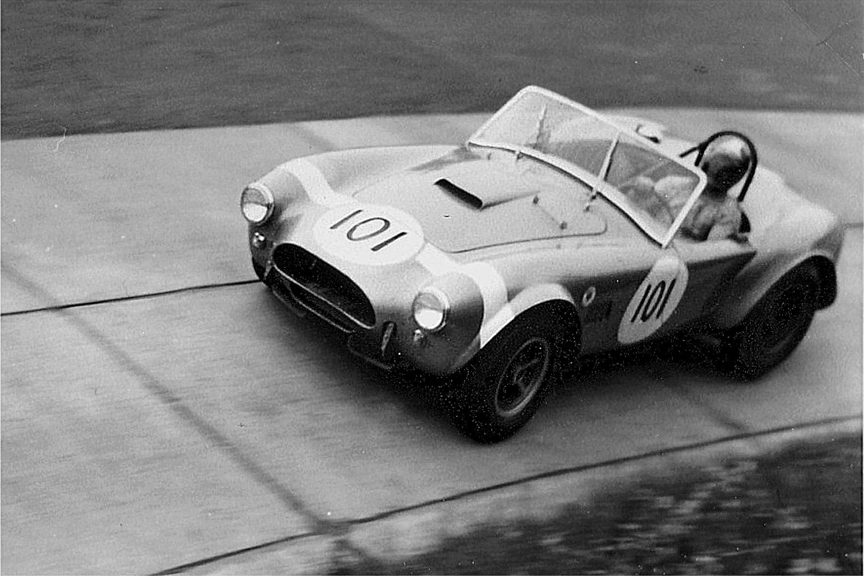 Shelby Cobra von Bondurant/Neerpasch; der Fahrer im Bild ist mit größter Wahrscheinlichkeit Bob Bondurant.